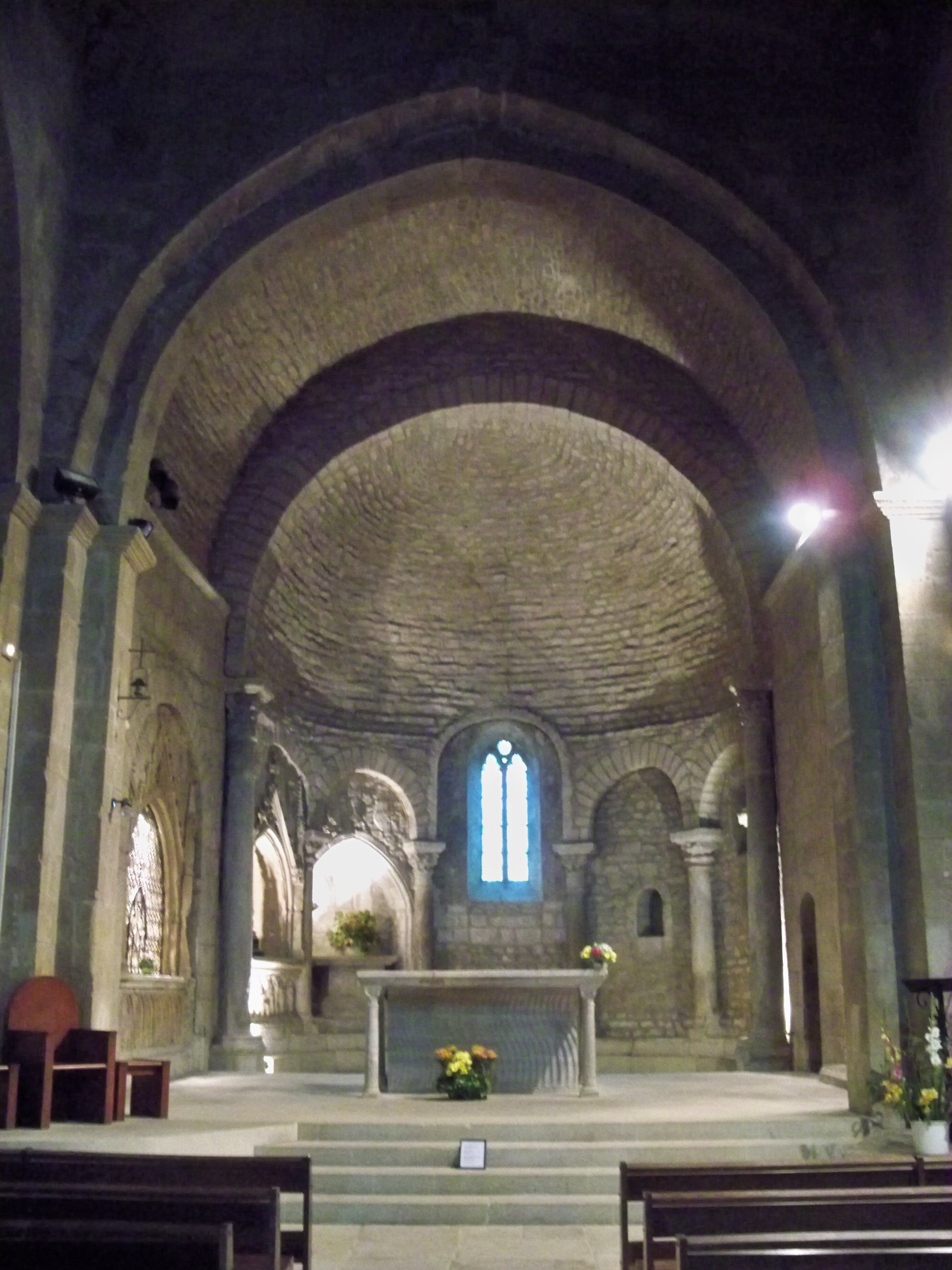 Autel central de la Cathédrale Notre-Dame-de-Nazareth de Vaison la Romaine, Vaucluse, France